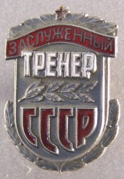 Знак к спортивному званию «Заслуженный тренер СССР»